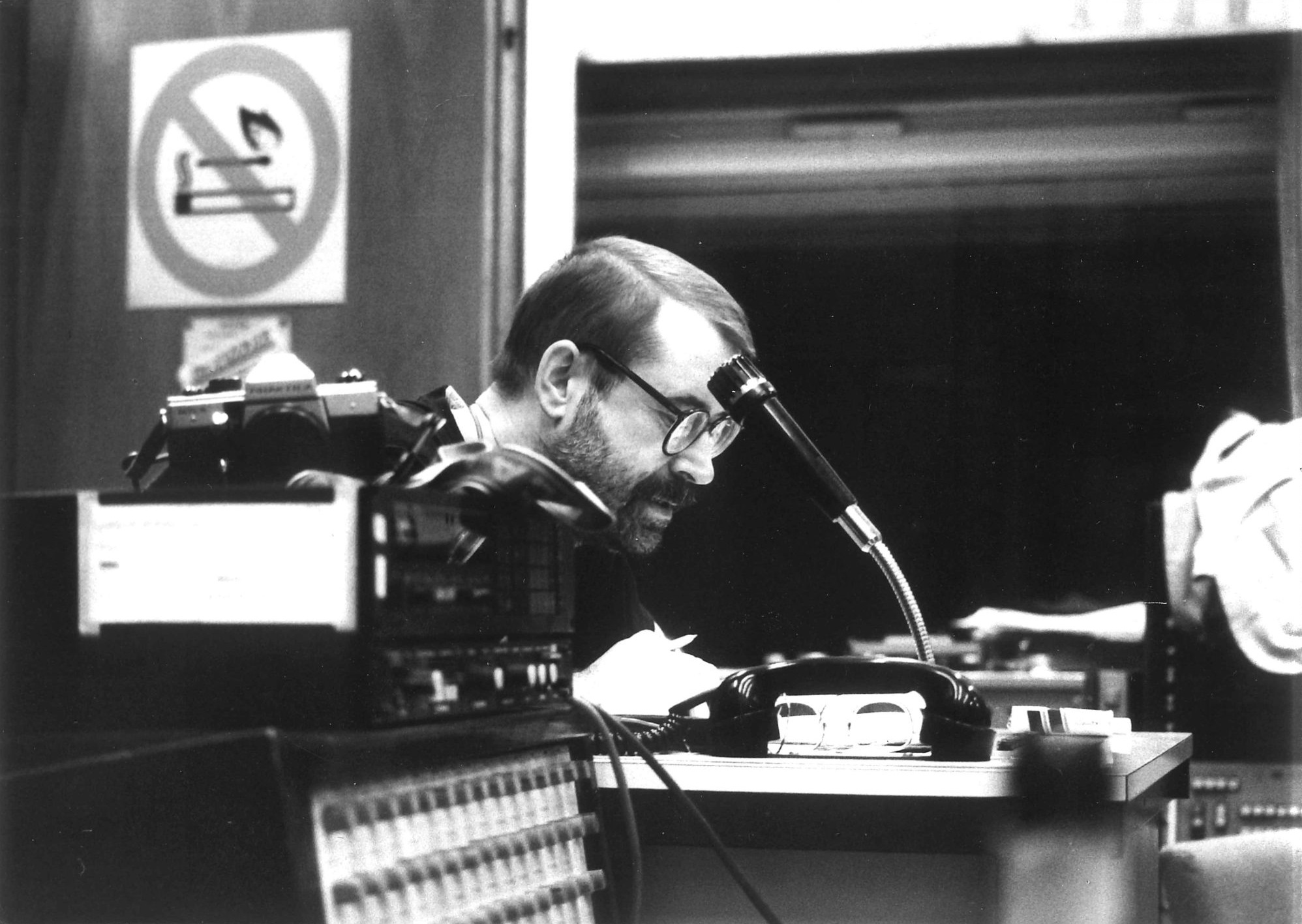 Der Regisseur Karlheinz Liefers bei einer Hörspielproduktion between 1990 and 1995 date QS:P,+1990-00-00T00:00:00Z/8,P1319,+1990-00-00T00:00:00Z/9,P1326,+1995-00-00T00:00:00Z/9 in einer Aufnahme des Berliner Fotografen Werner Bethsold.